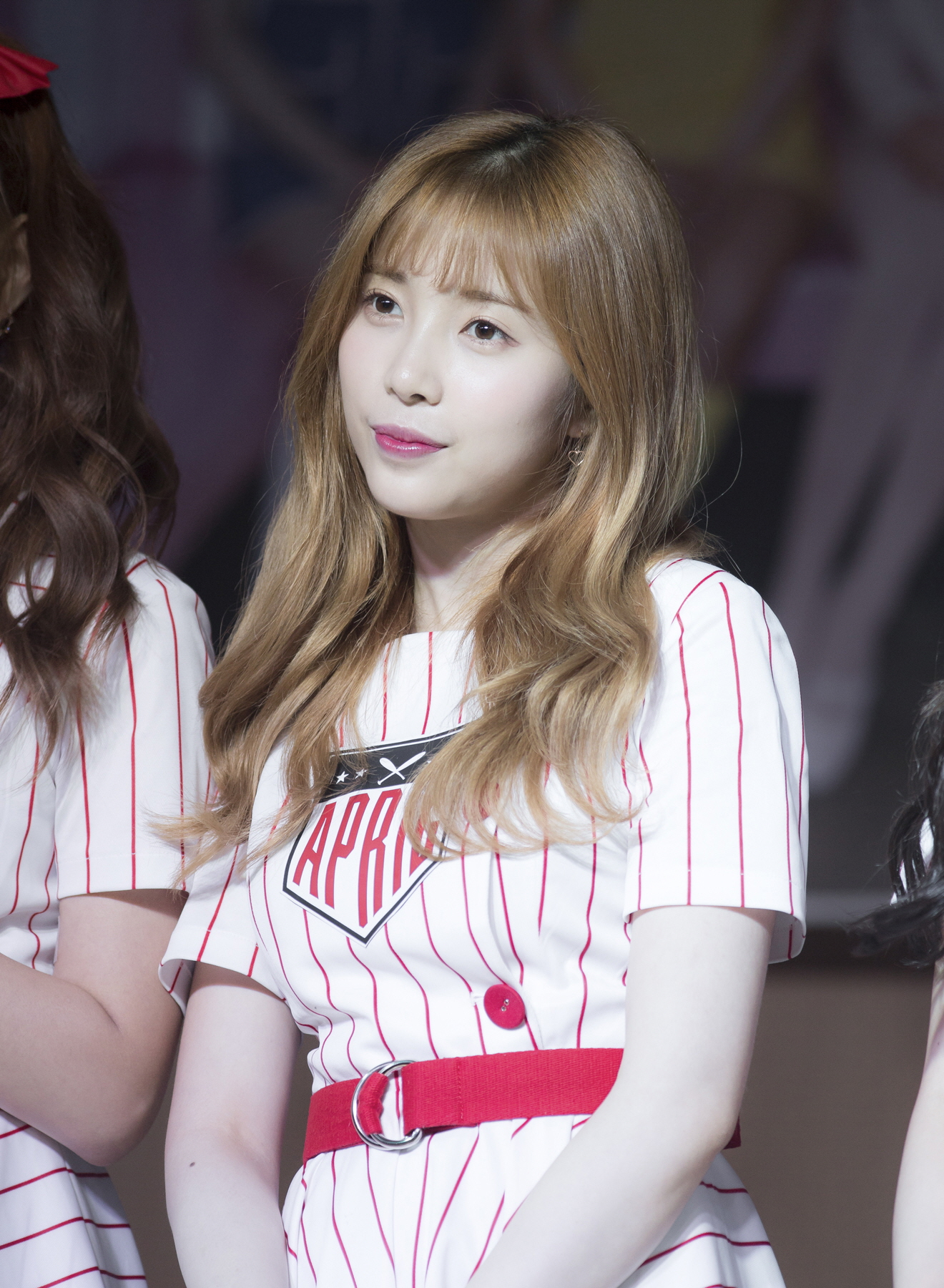 170624 수원팬싸인회